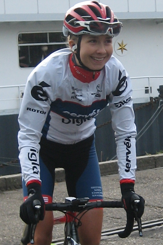 Start van de Amstel Gold Race Ladies Edition 2017 in Maastricht.